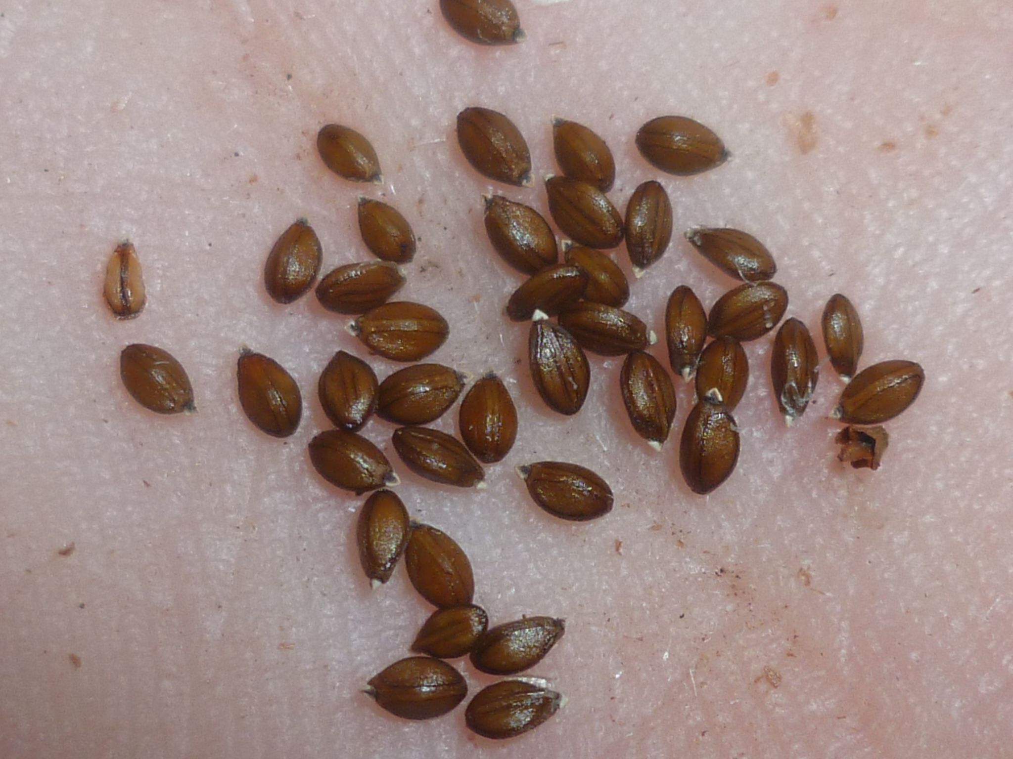 Akène de brunelle commune